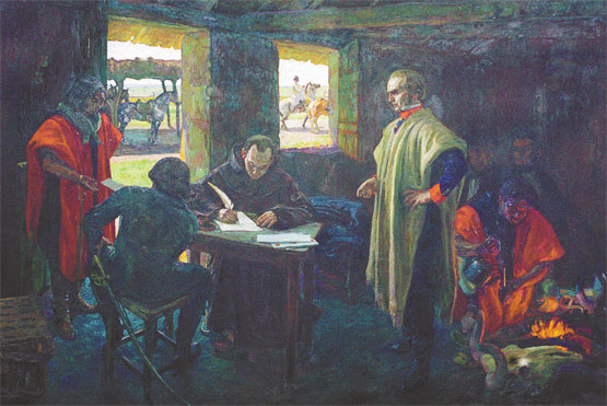 Pintura de Pedro Blanes Viale, Artigas dictando correspondencia a su secretario José Monterroso.